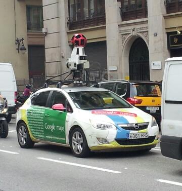 Via Laietana, 17-09-2014.